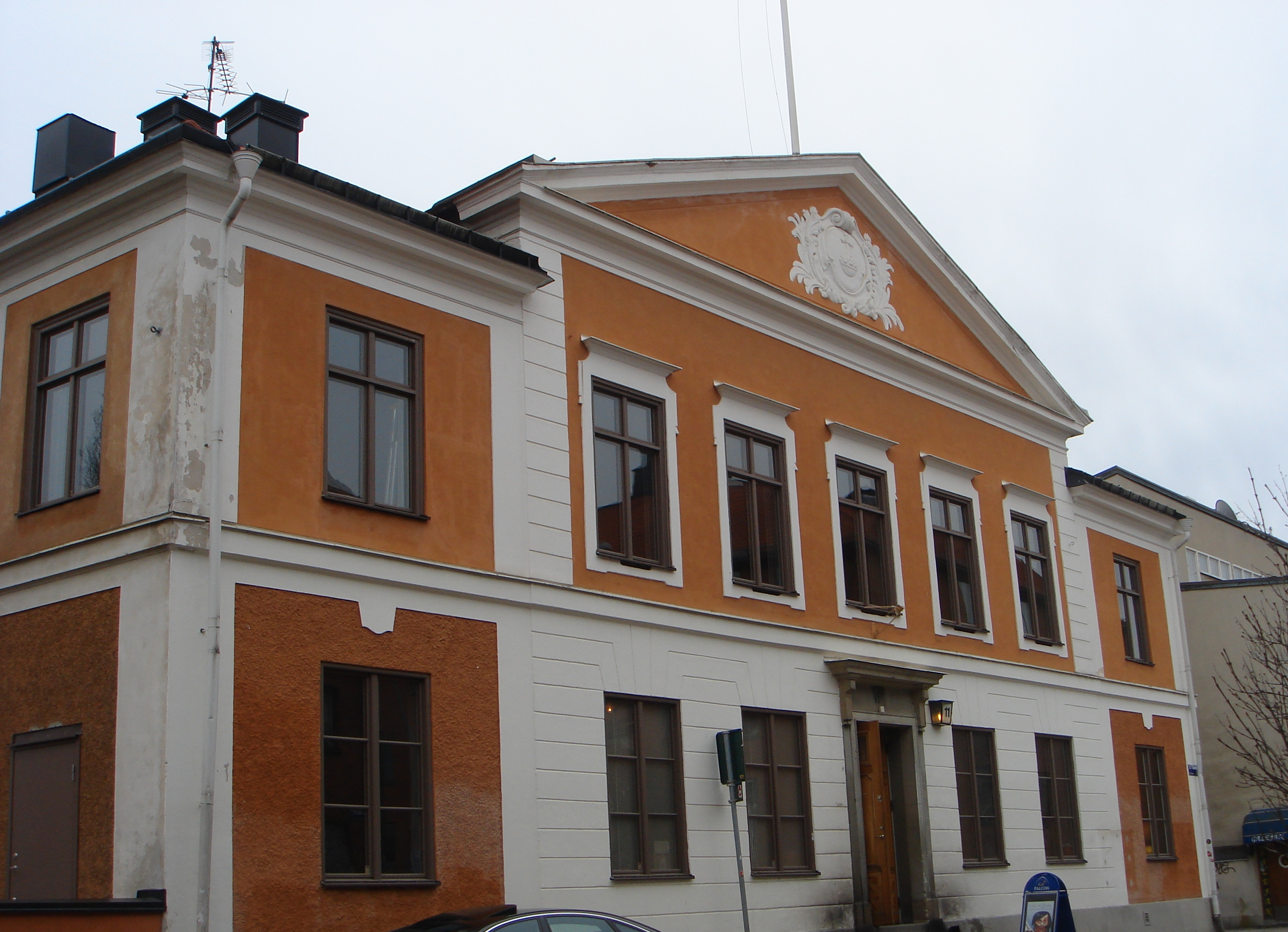 Upplands nation, Uppsala, Sweden